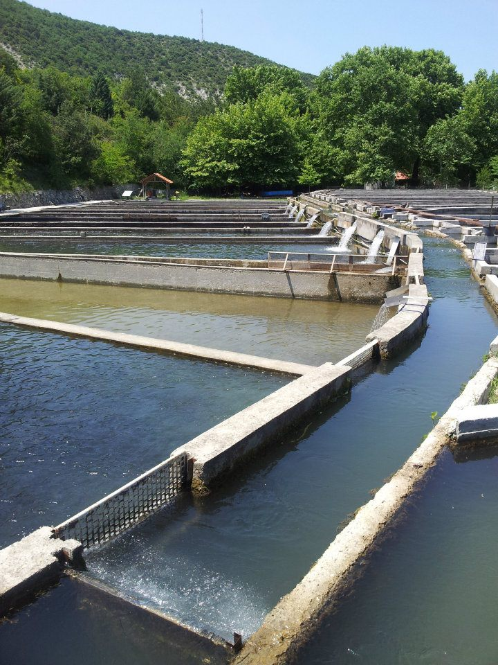 рибник